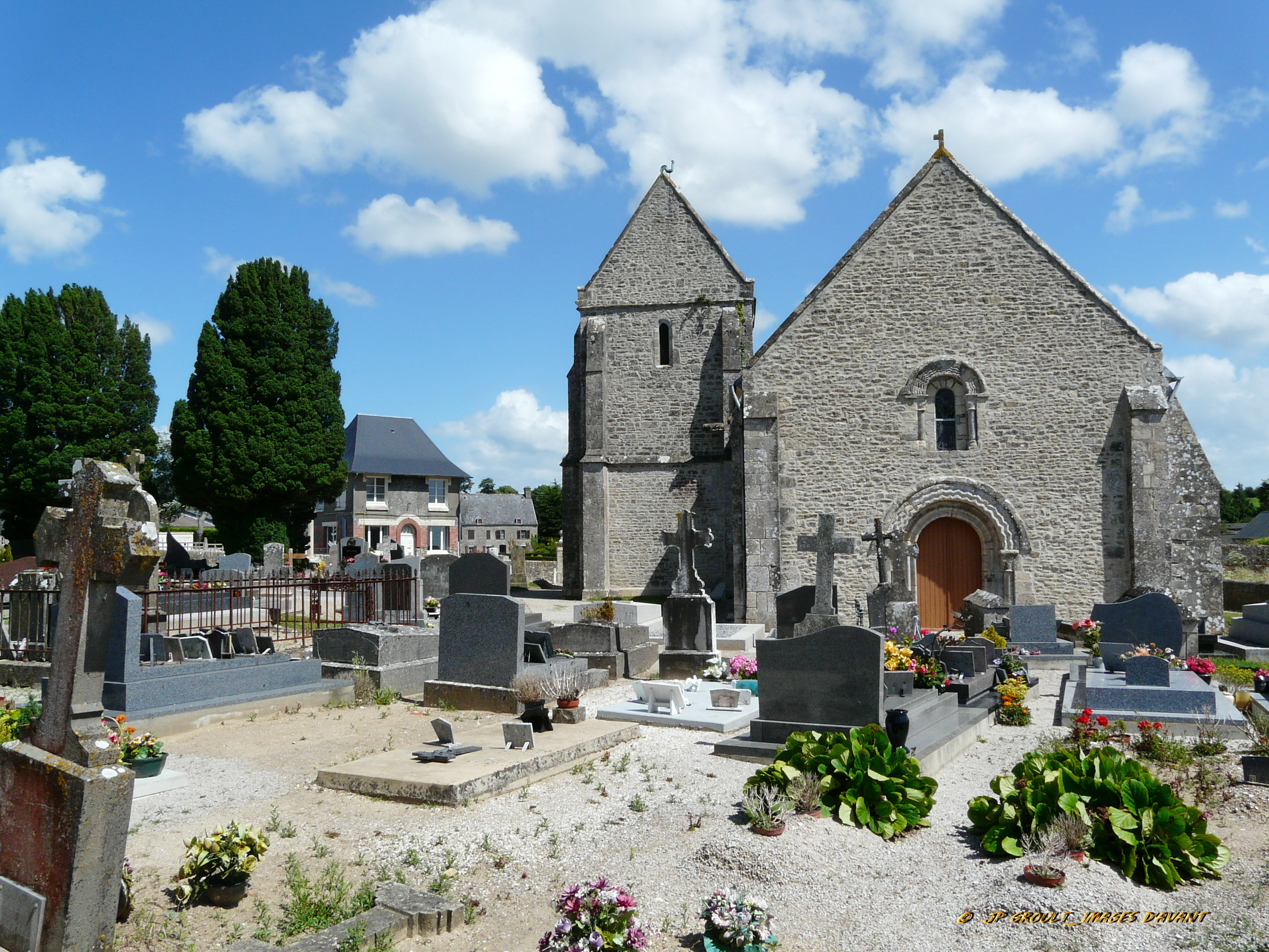 Vue Ouest